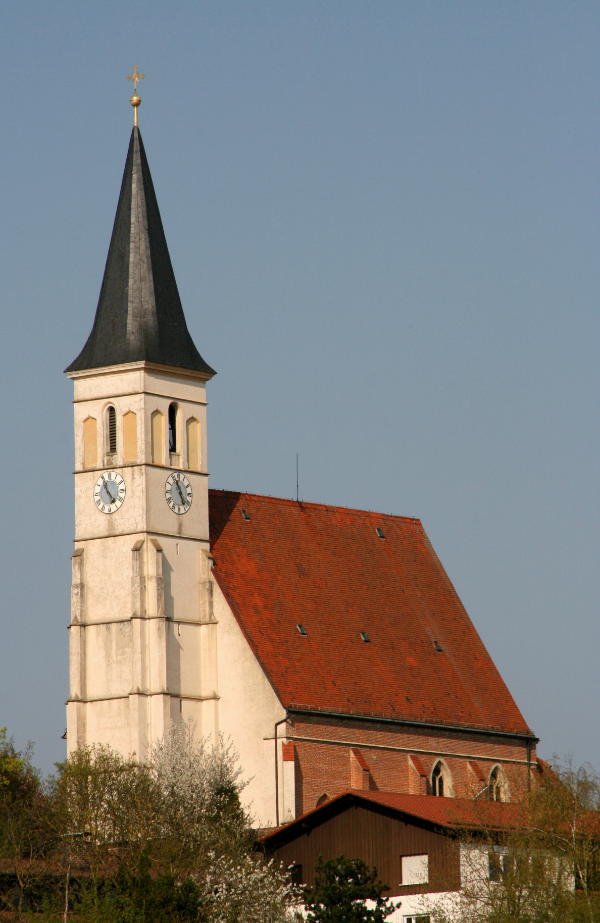 St. Laurentius in Altmühldorf (Stadt Mühldorf am Inn, Landkreis Mühldorf am Inn, Oberbayern). Die um 1518 errichtete spätgotische Hallenkirche ist ein Werk der Burghauser Bauschule.